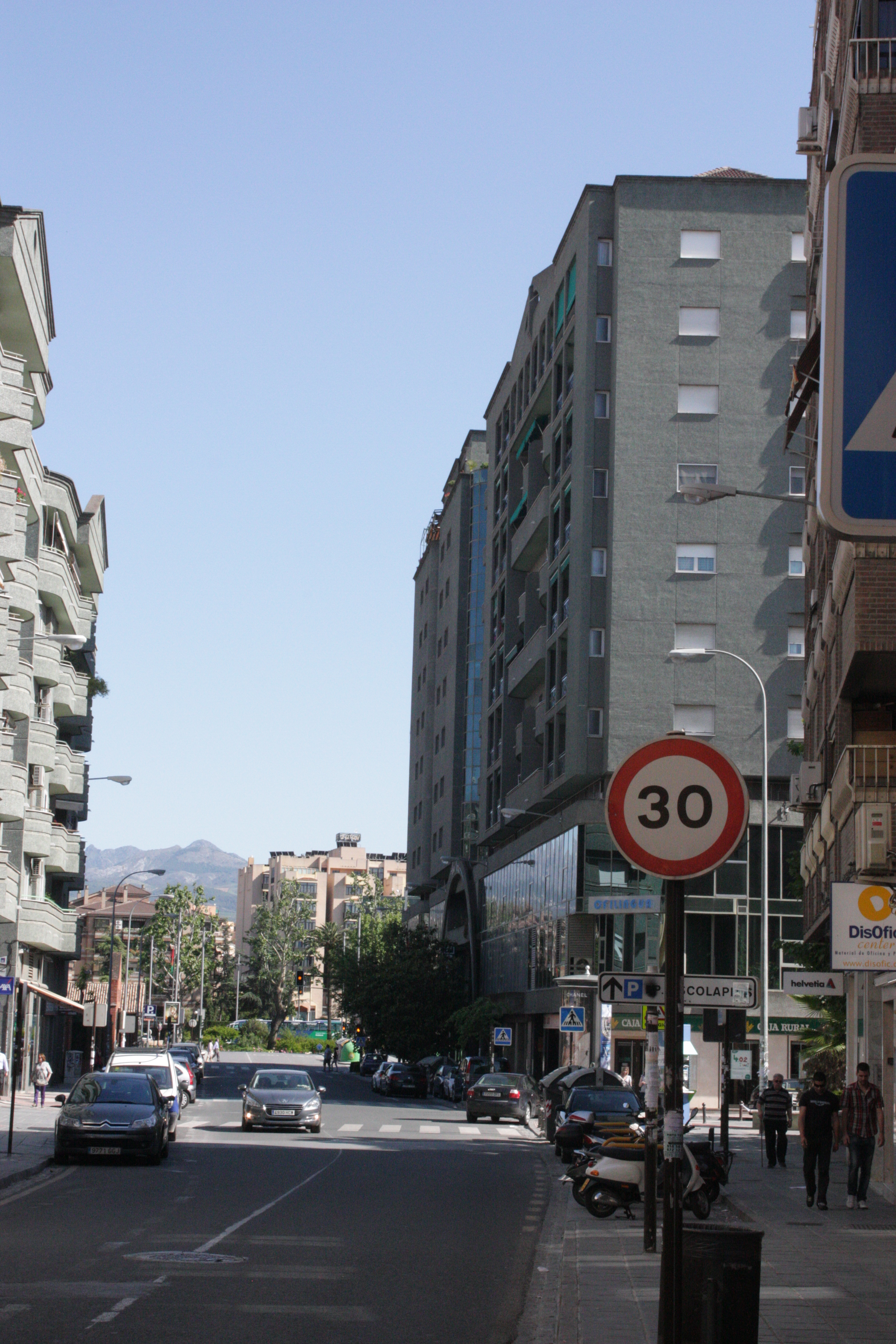 Vista de la calle San Antón, en dirección al río Genil, en Granada, España. El edificio verde principal es el Hotel San Antón.